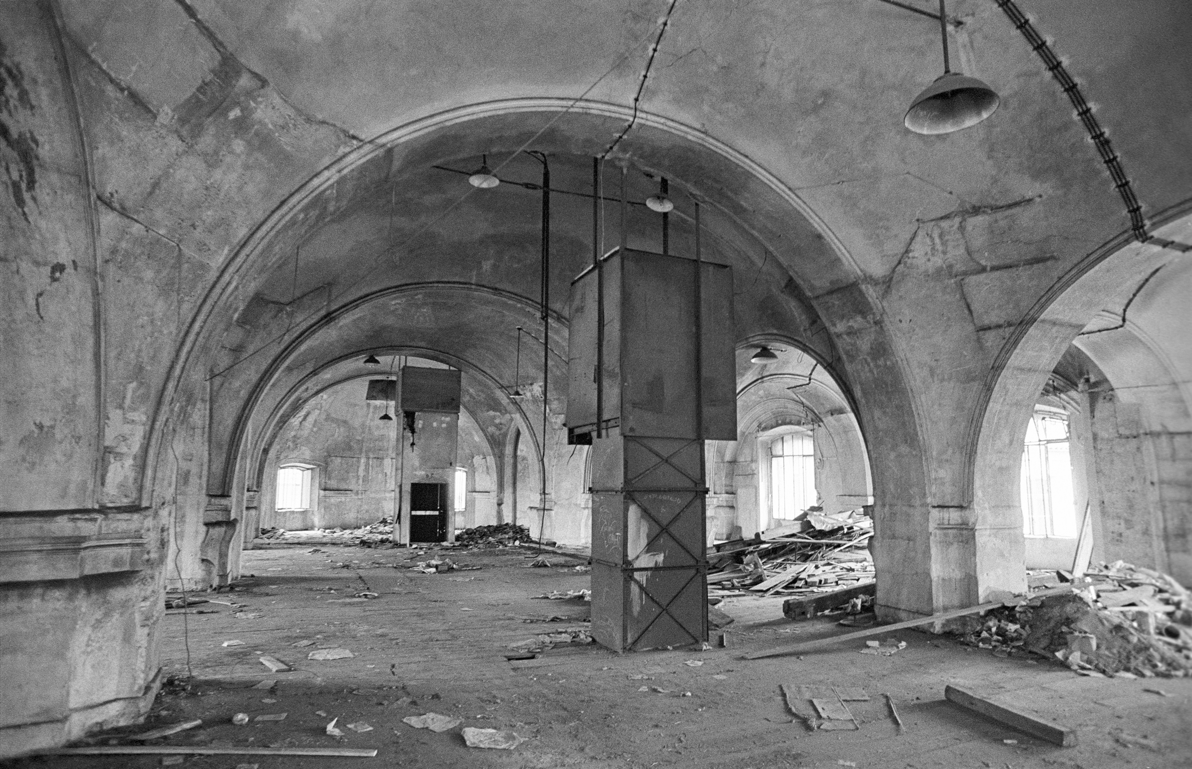 4. nadzemní podlaží